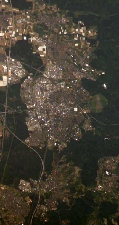 Darmstadt aufgenommen im Mai 2007 von der ISS